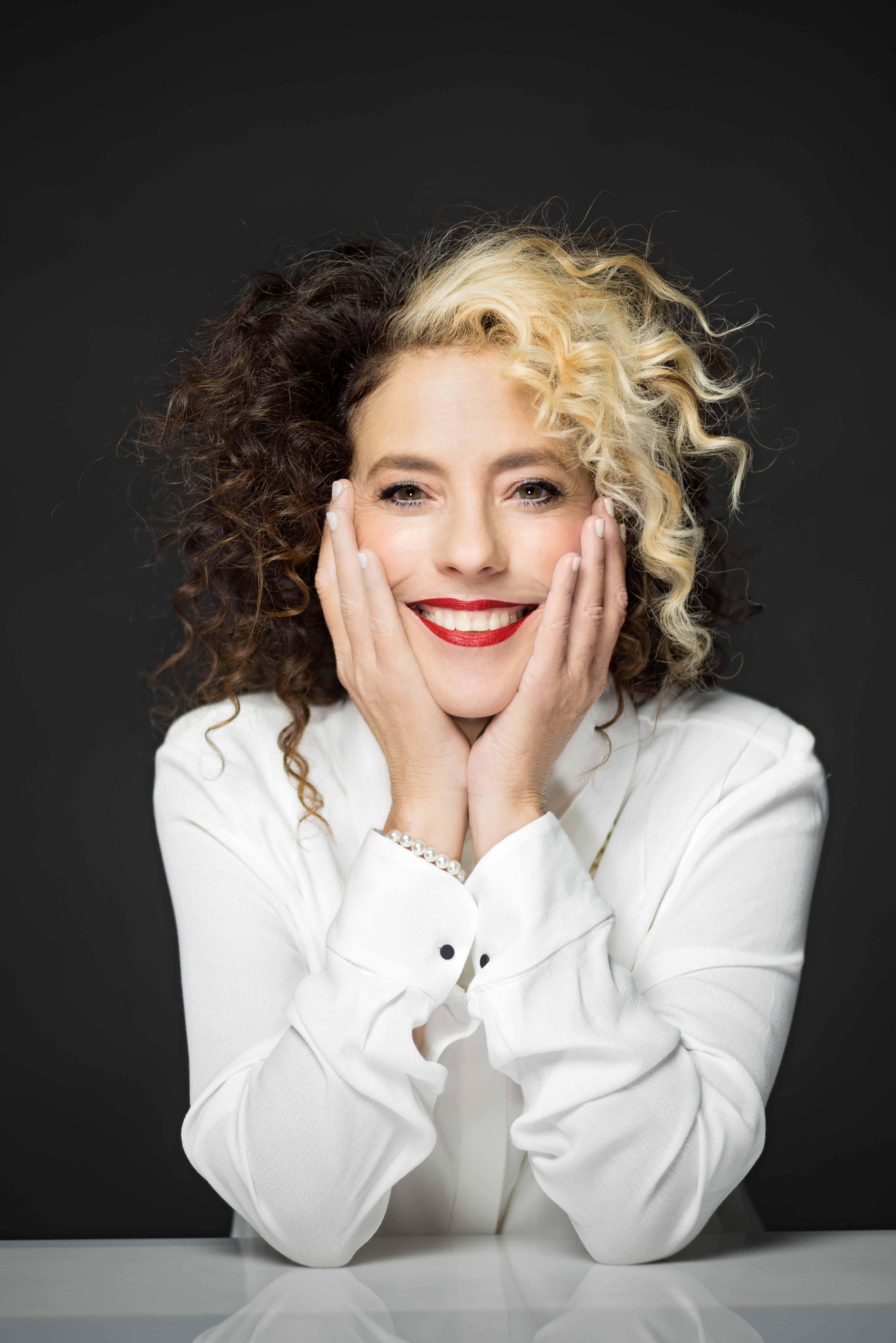 פז מושקוביץ גן-זך